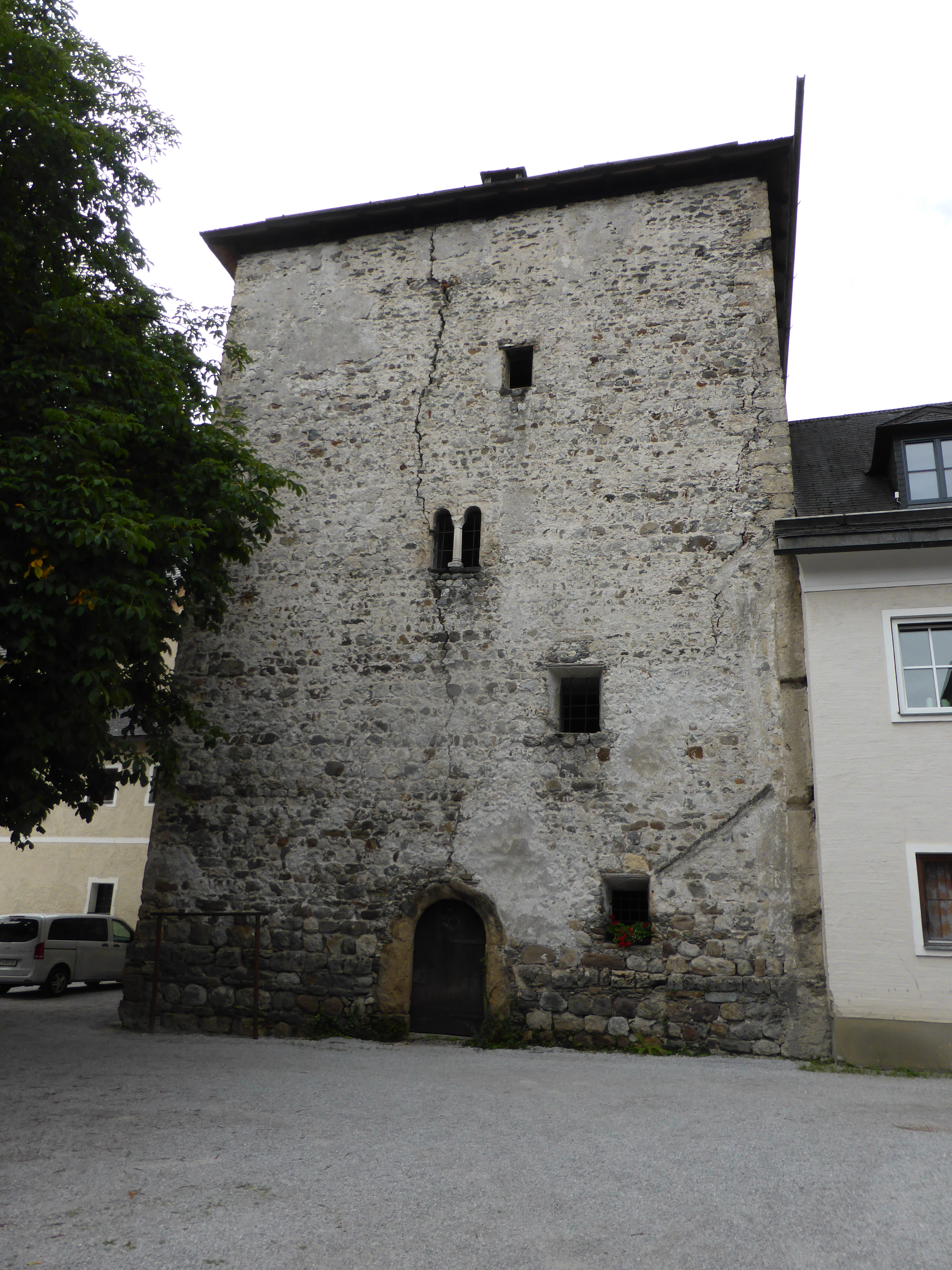 Kastenturm